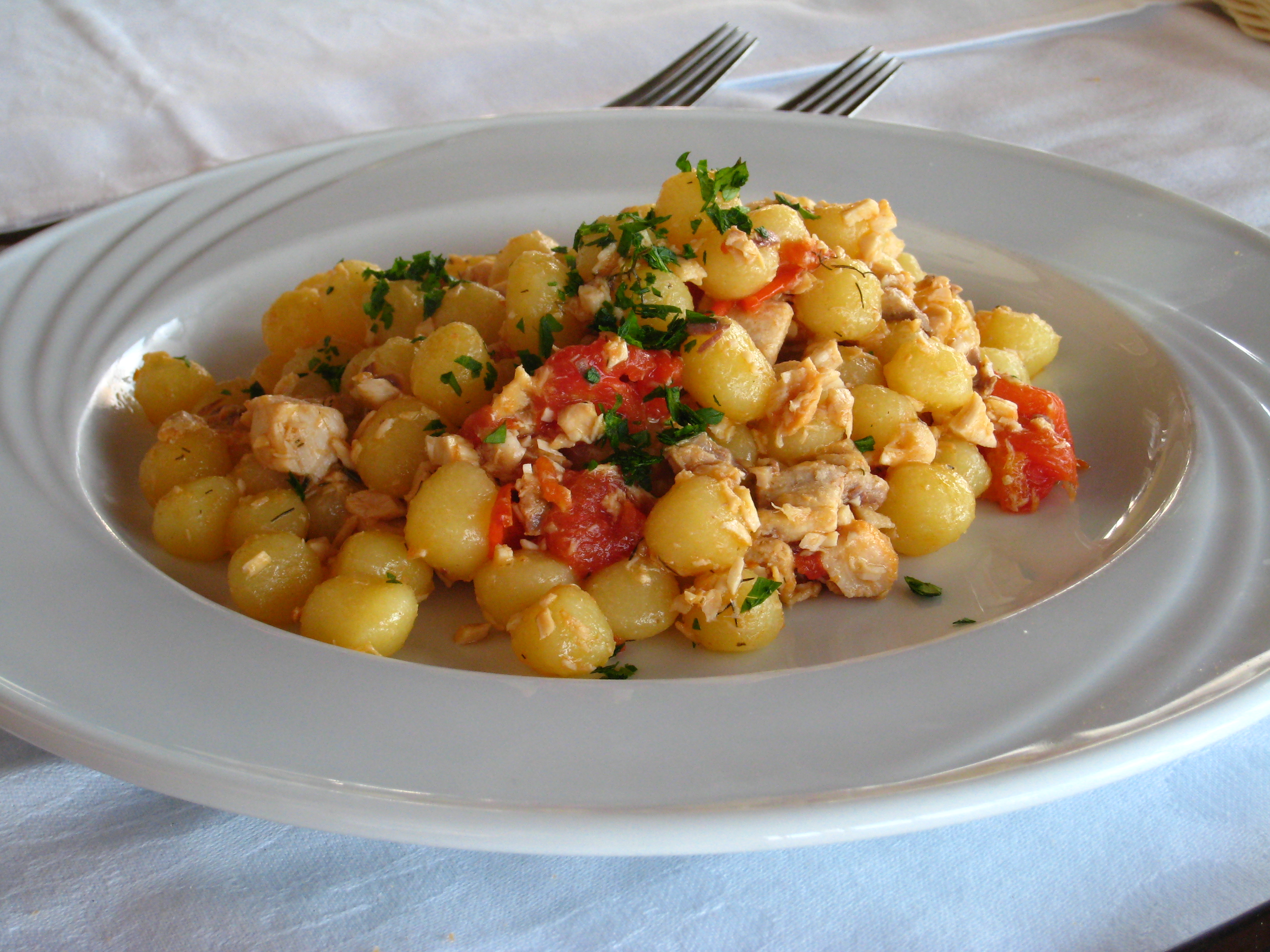 Gnocchi